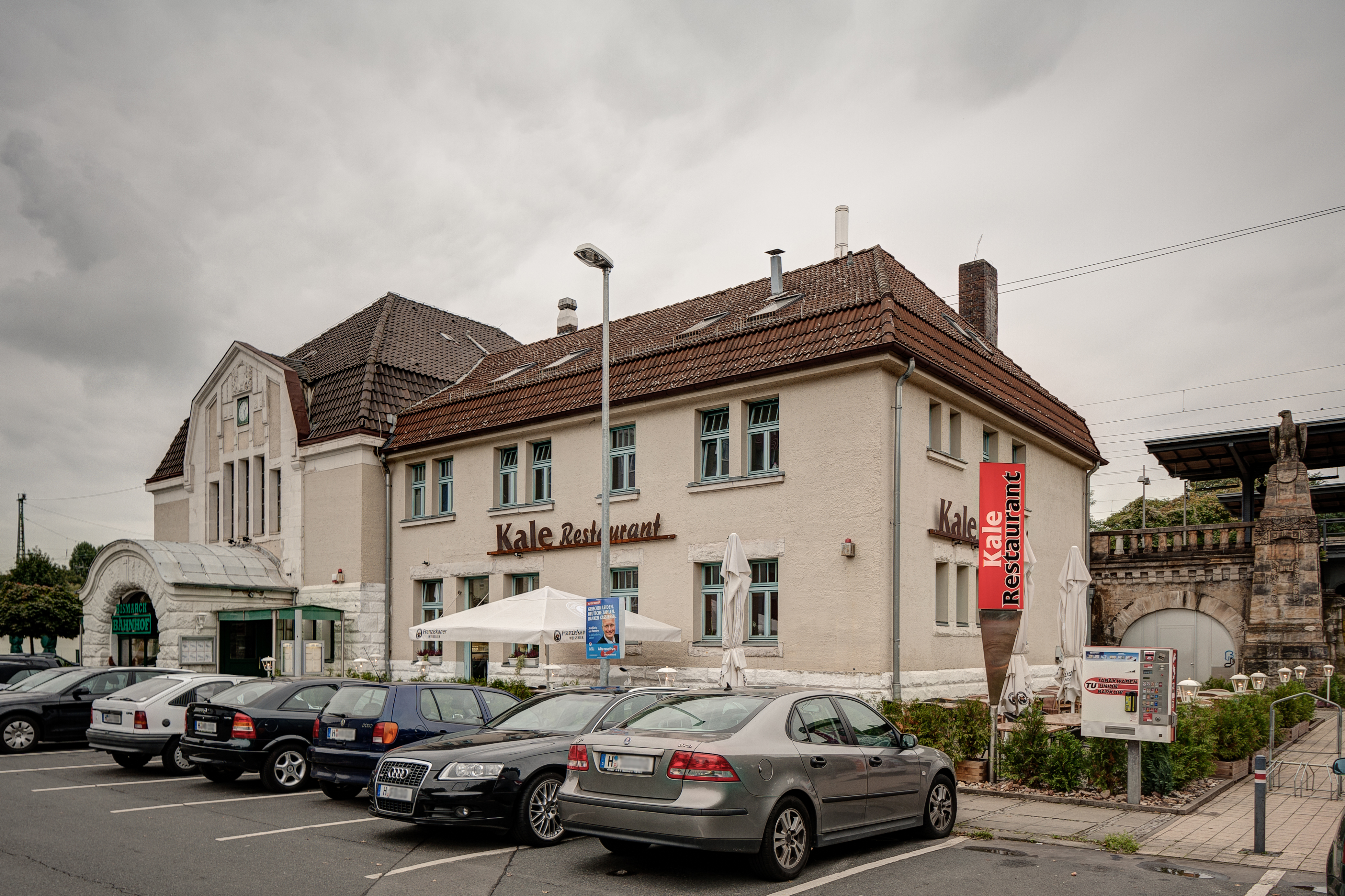 Ehemaliges Empfangsgebäude des Bahnhofs Hannover-Bismarckstraße. Das Gebäude wurde 1911 fertiggestellt und dient zum Zeitpunkt der Aufnahme (2013) als gastronomischer Betrieb.